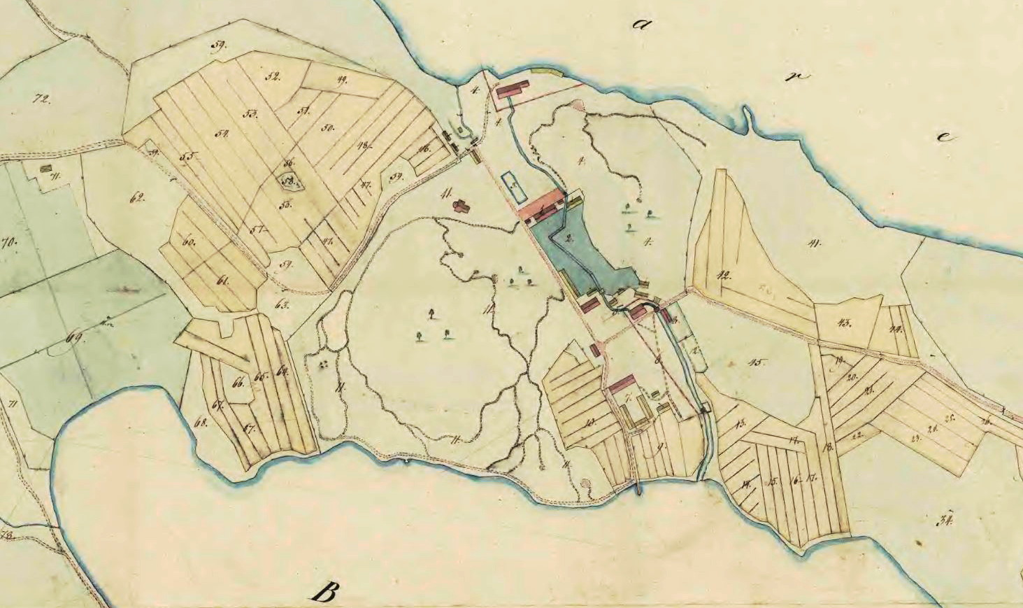 Vällinge gård